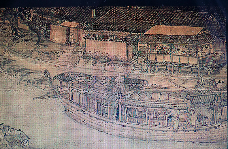 Весло-колесо, 1726